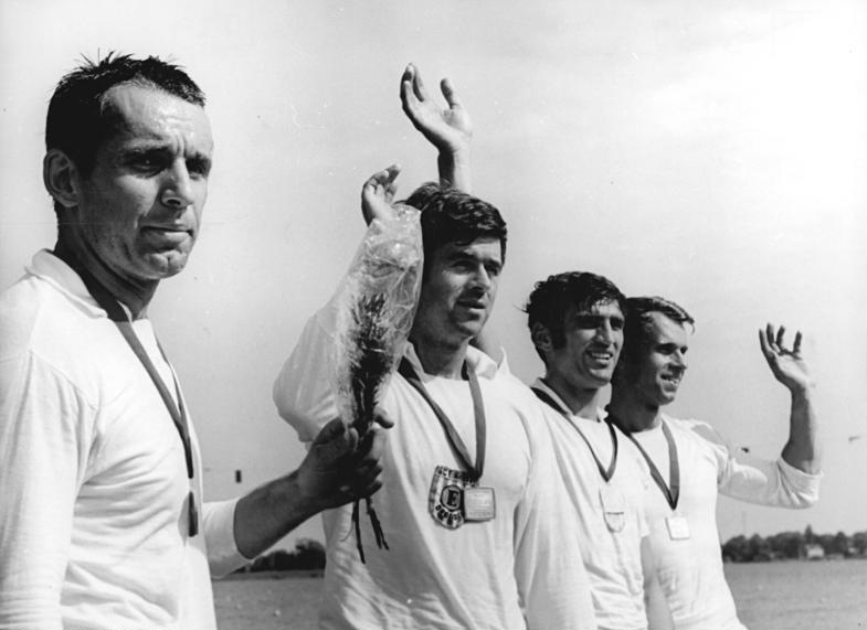 F. Ferberger, F. Rühle, D. Grahn, D. Schubert Zentralbild Franke 20.7.70 Brandenburg (Havel): DDR-Meisterschaften im Rudern (Finale am 19.7.70)- Den überzeugendsten Sieg errang der Vierer ohne Steuermann des SC Einheit Dresden - Olympiasieger; Welt- und Europameister. Während der Siegerehrung (vlnr) Schlagmann Frank Forberger, Frank Rühle, Dieter Grahn und Dieter Schubert.